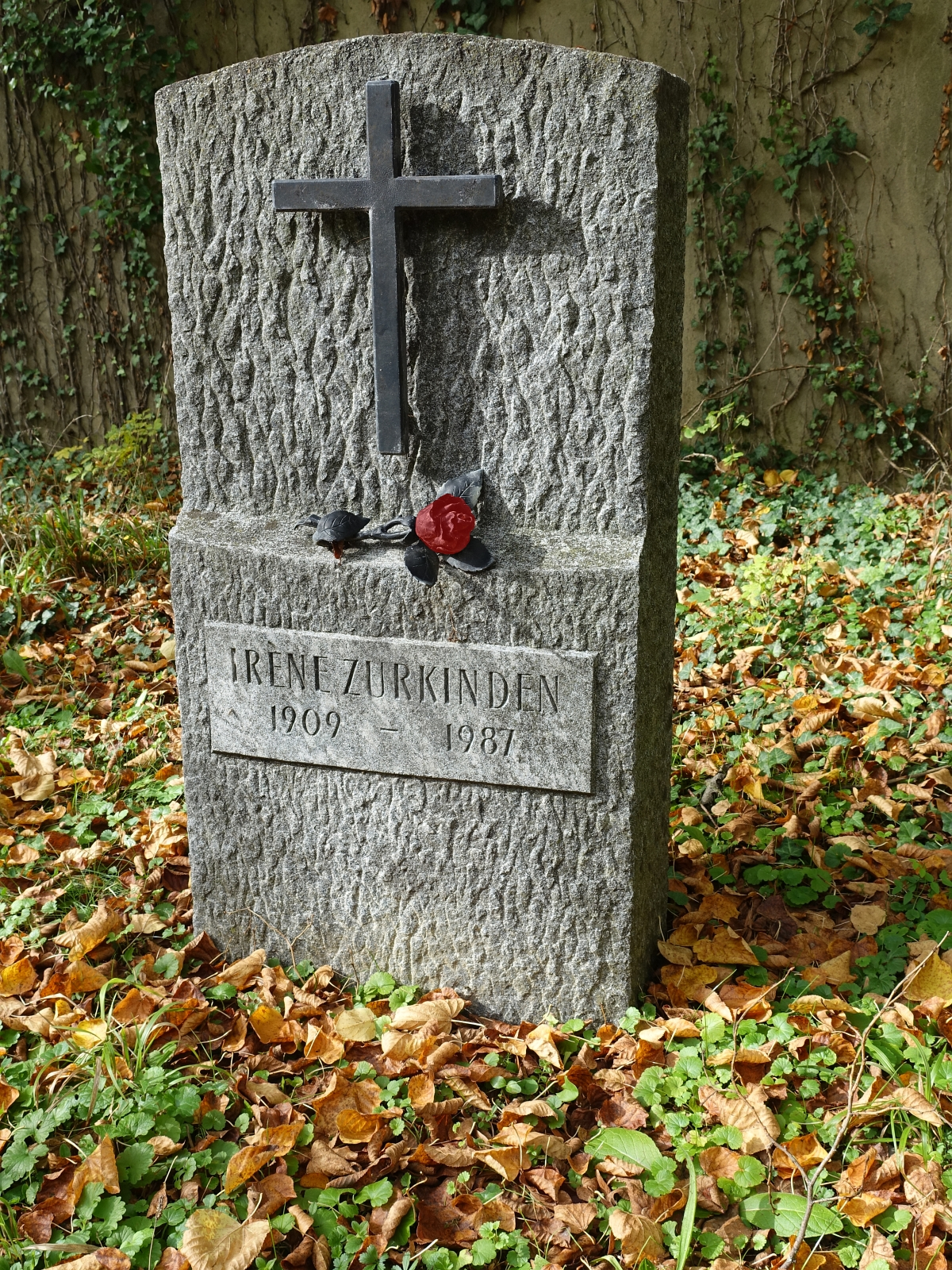 Irène Zurkinden (1909-1987) Malerin. Prominenten Grabfeld auf dem Friedhof am Hörnli